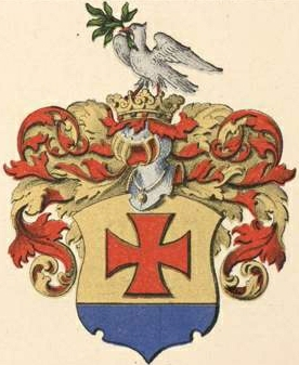 Cube suguvõsa aadlivapp